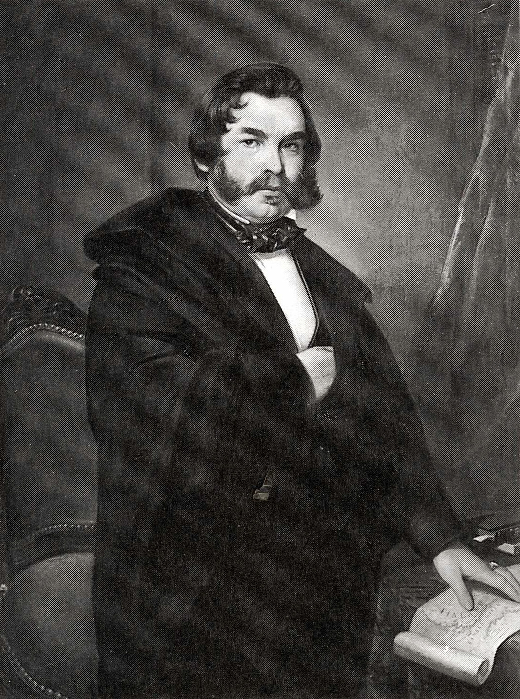 Erik Johan Löfgrenin maalaama muotokuva professori Fredrik Cygnaeuksesta.